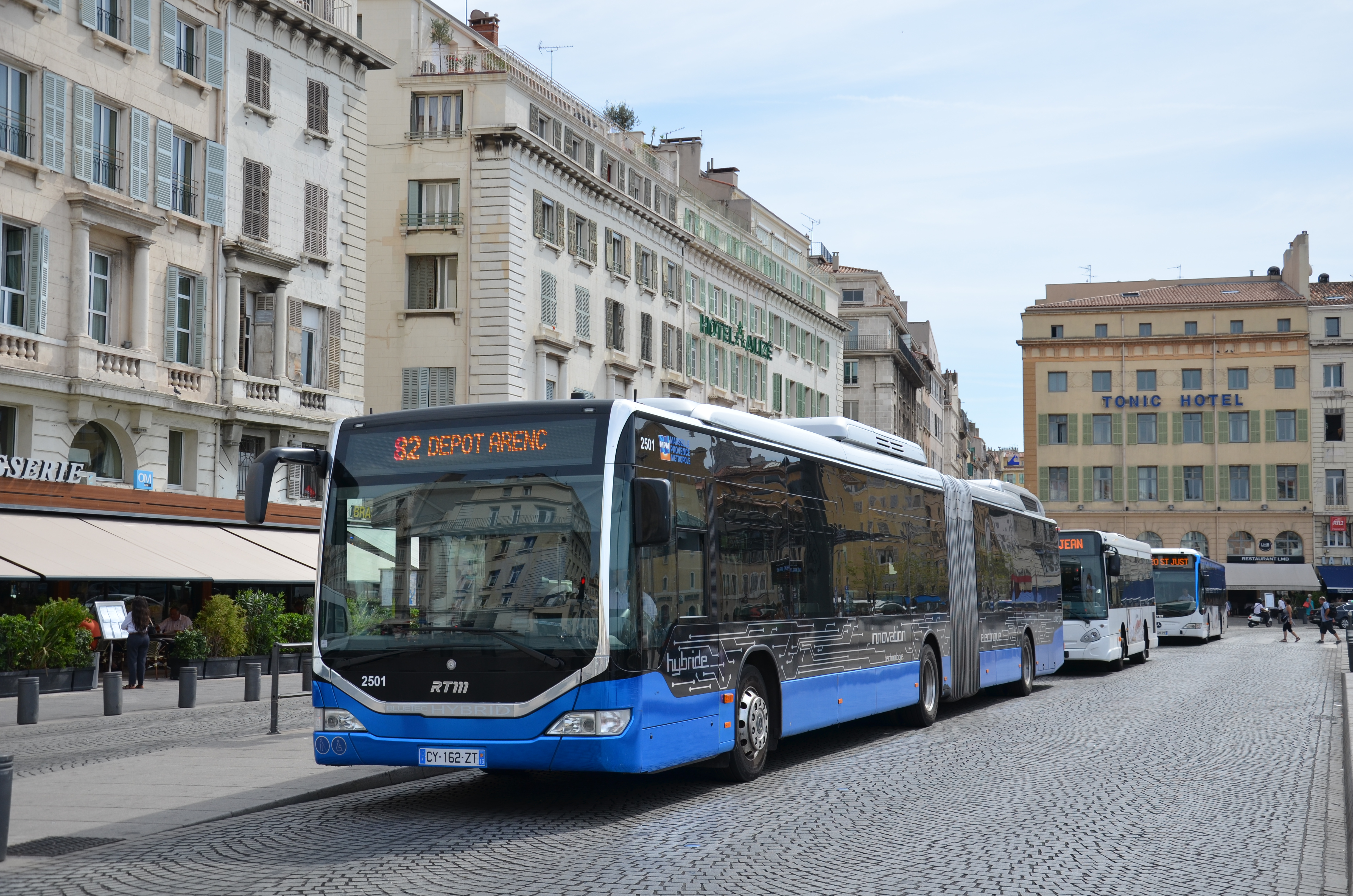 Mercedes O.530G II BlueTech Hybrid n°2501 sur la ligne 82 du réseau RTM de Marseille, à la station Métro Vieux Port.